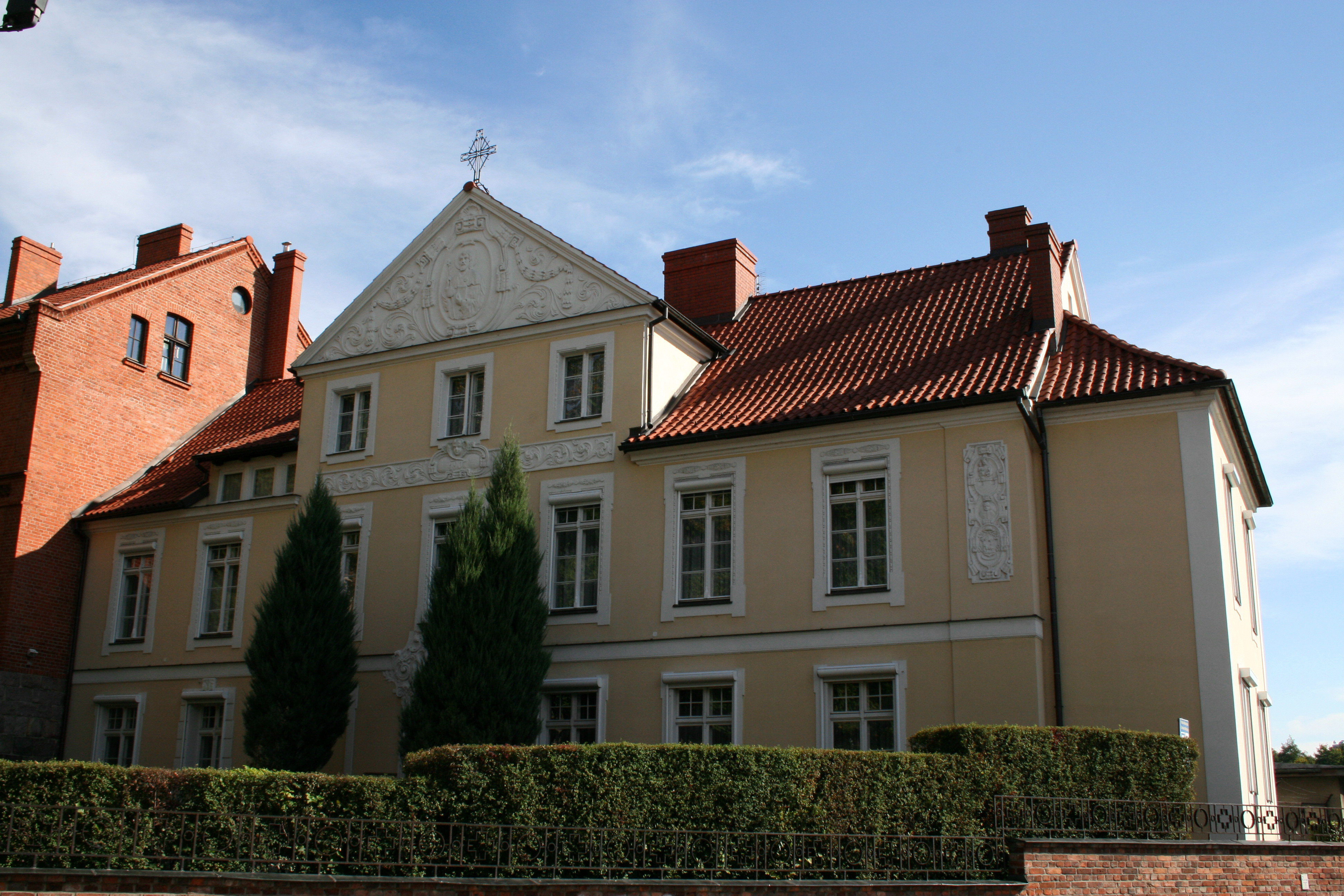 Olsztyn, ul. Staszica 5 - pałacyk archiprezbitera (zabytek nr A-2456)